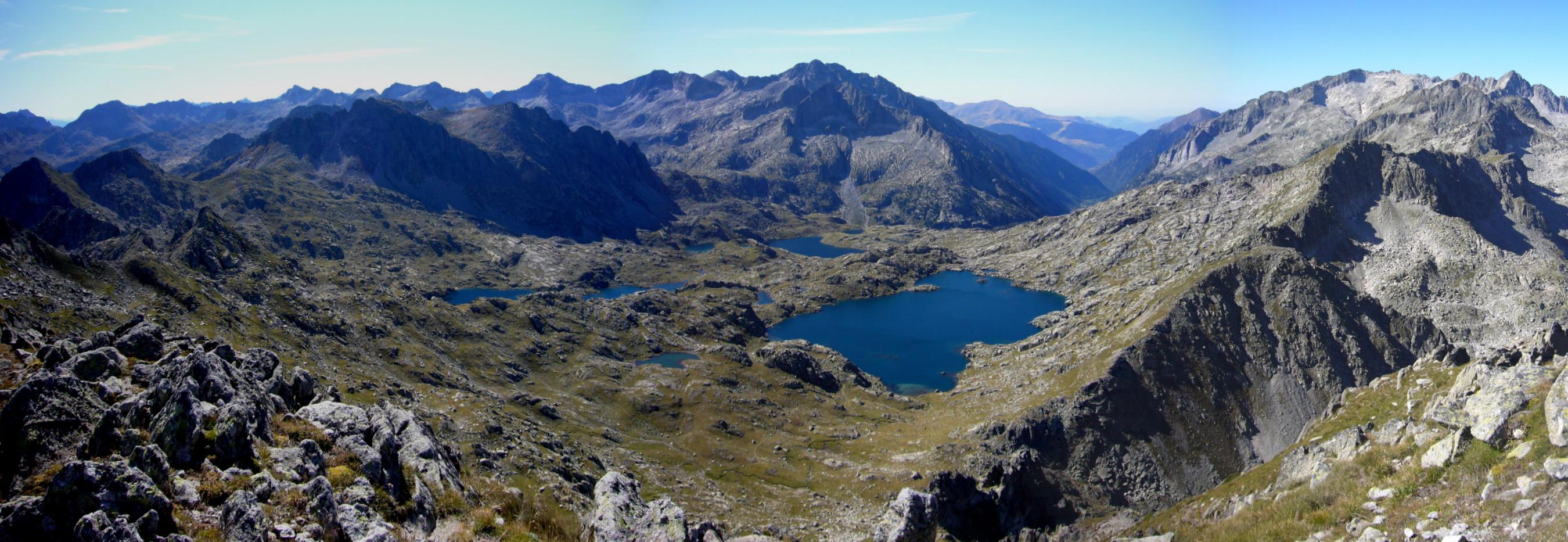 Capçalera de Caldes vista des del Montardo Petit; la Vall de Boí, Alta Ribagorça, Catalunya